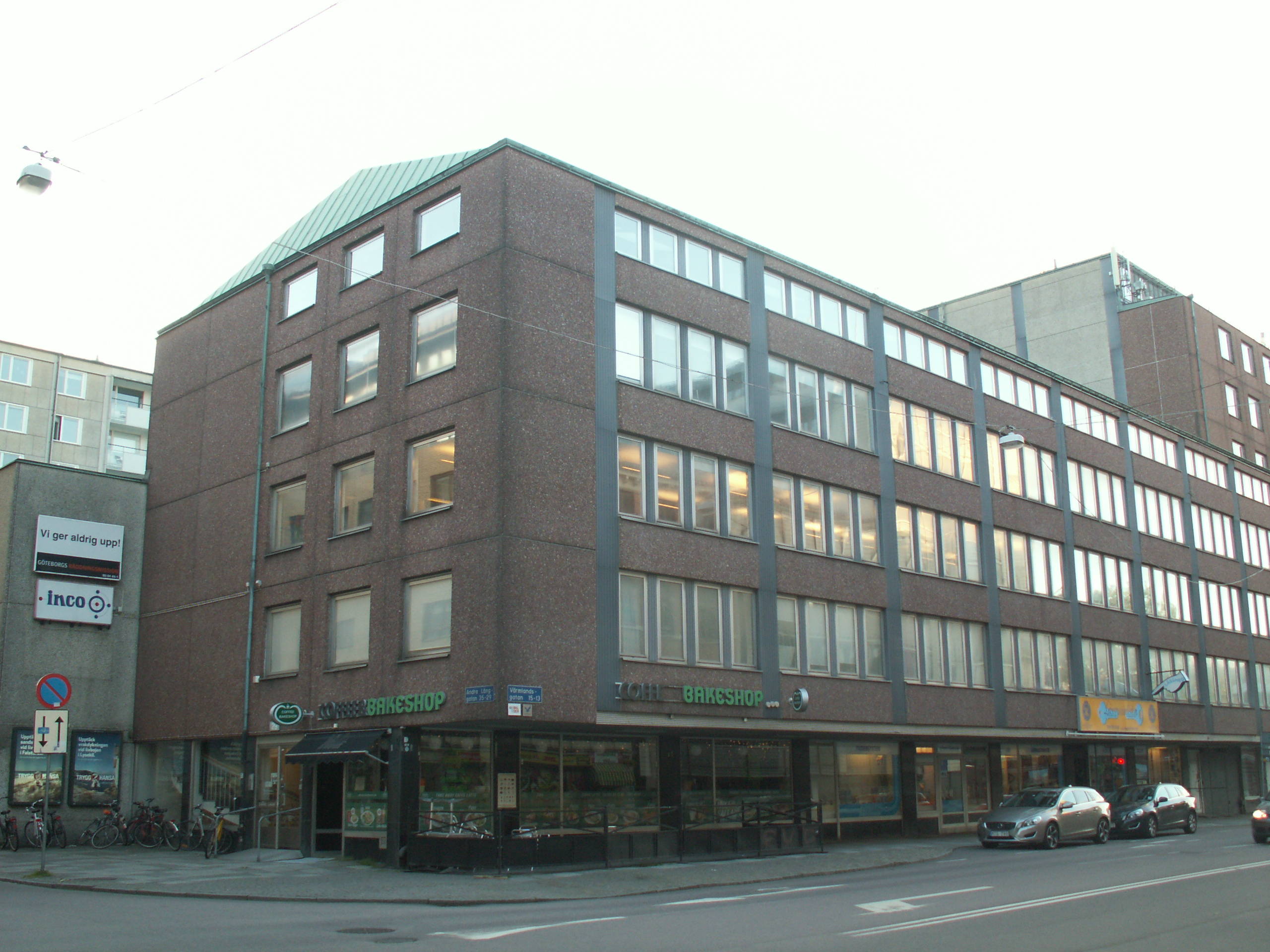 Huset vid Andra Långgatan 29 (hörnet mot Värmlandsgatan) i Göteborg. Huset är numera ett kontorshus, men det var under 1970- och 1980-talet plats för Journalisthögskolan i Göteborg.